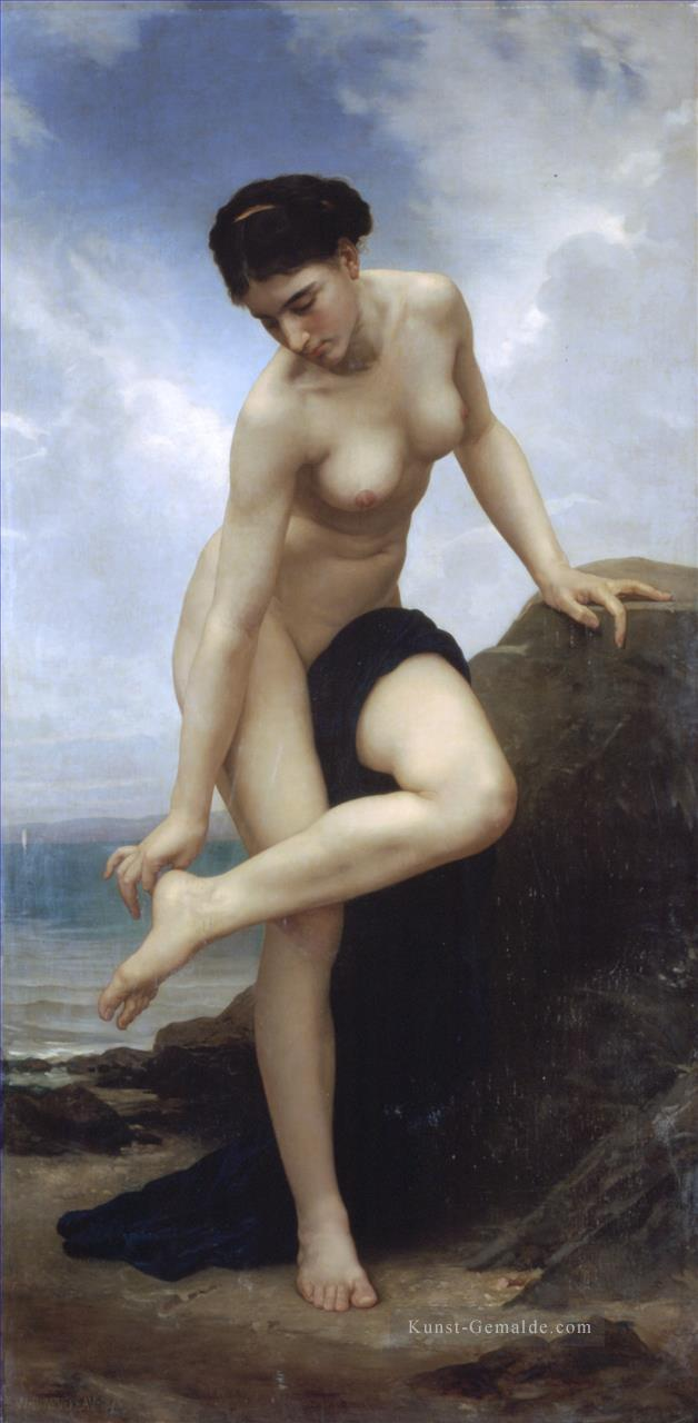 После ванны